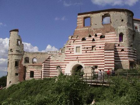 Zamek w Janowcu - fasada frontowa